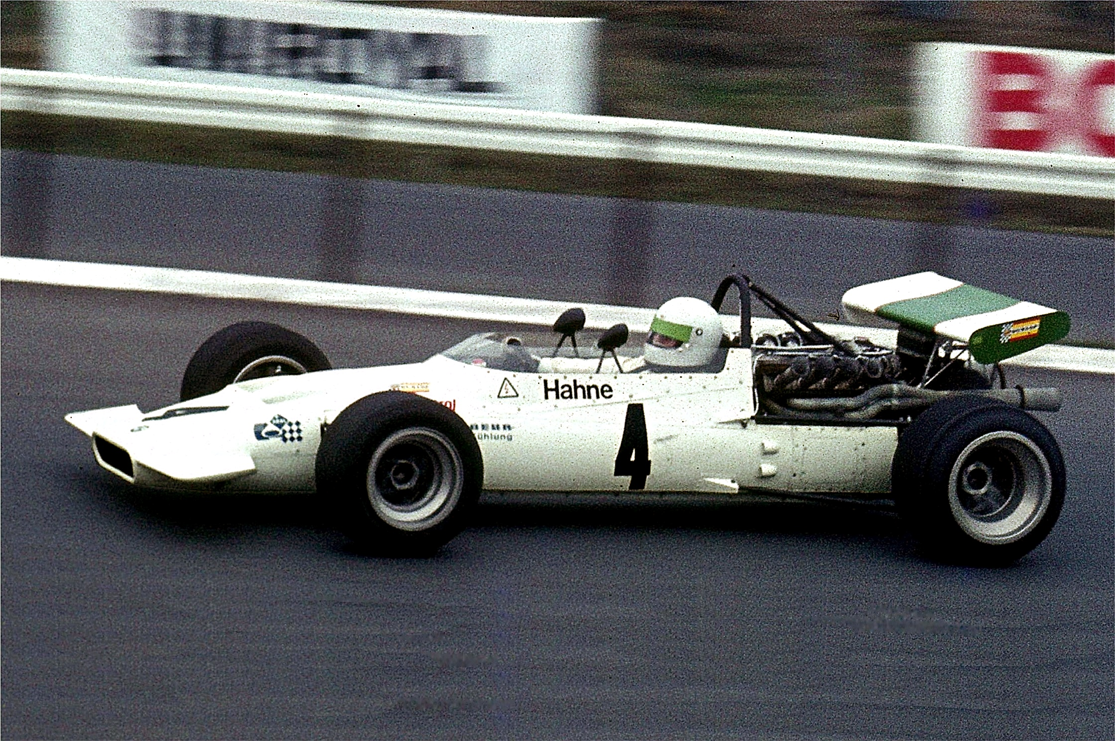 BMW Formel 2 mit Hubert Hahne (BMW 269)